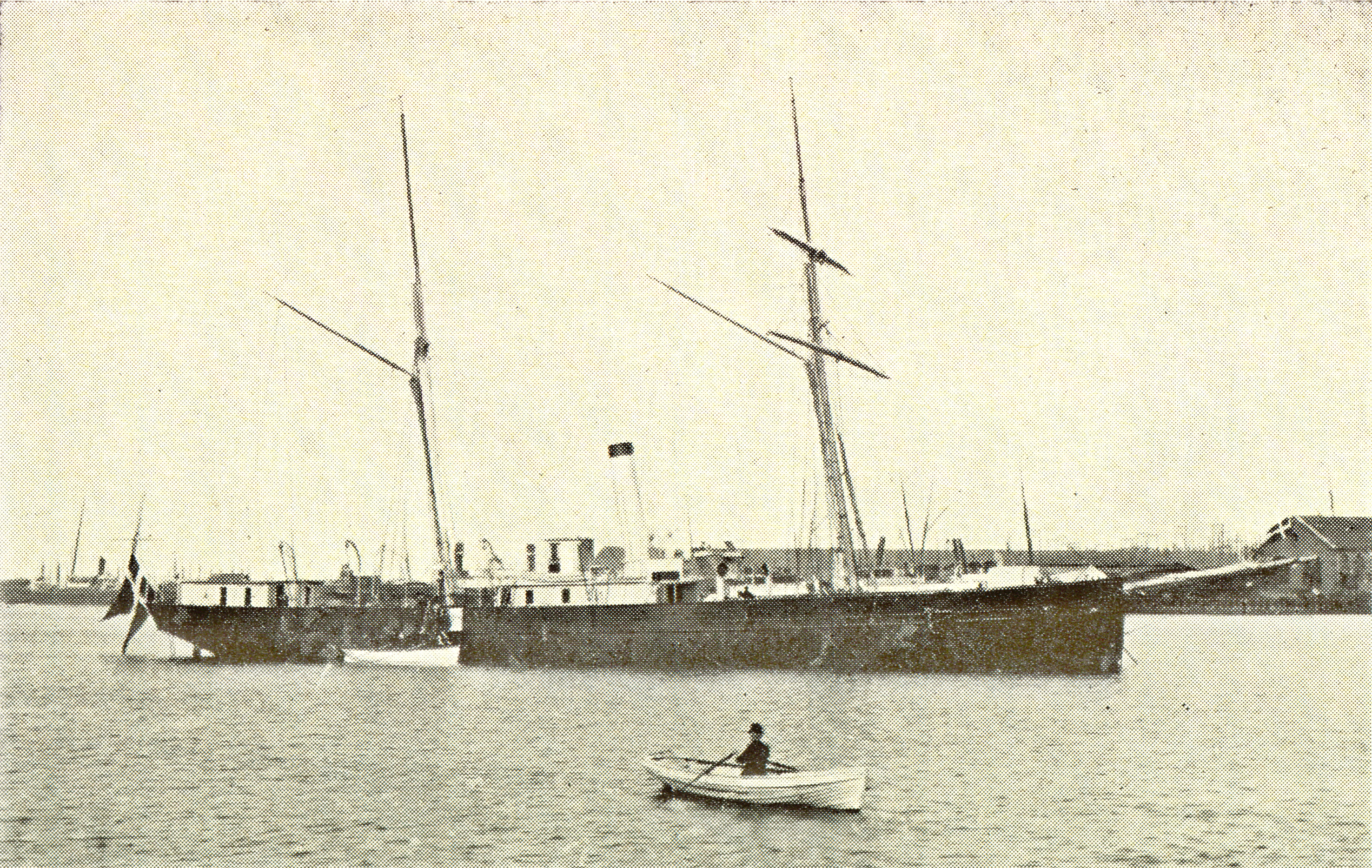 {da}Panserskonnerten Absalon (1862) {en}Danish Armoured Gunboat Absalon (1862)